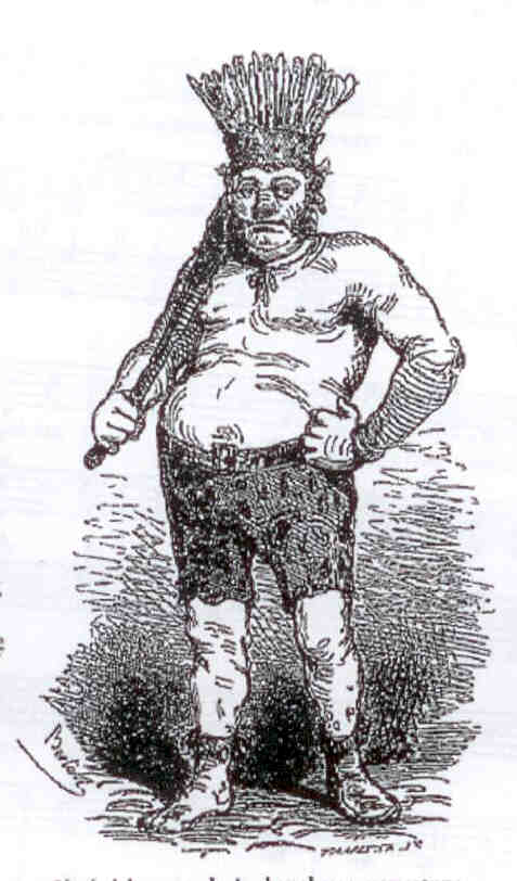 Un Sacrificateur, personnage traditionnel escortant le Bœuf gras au Carnaval de Paris (un de part et d'autre du bœuf).